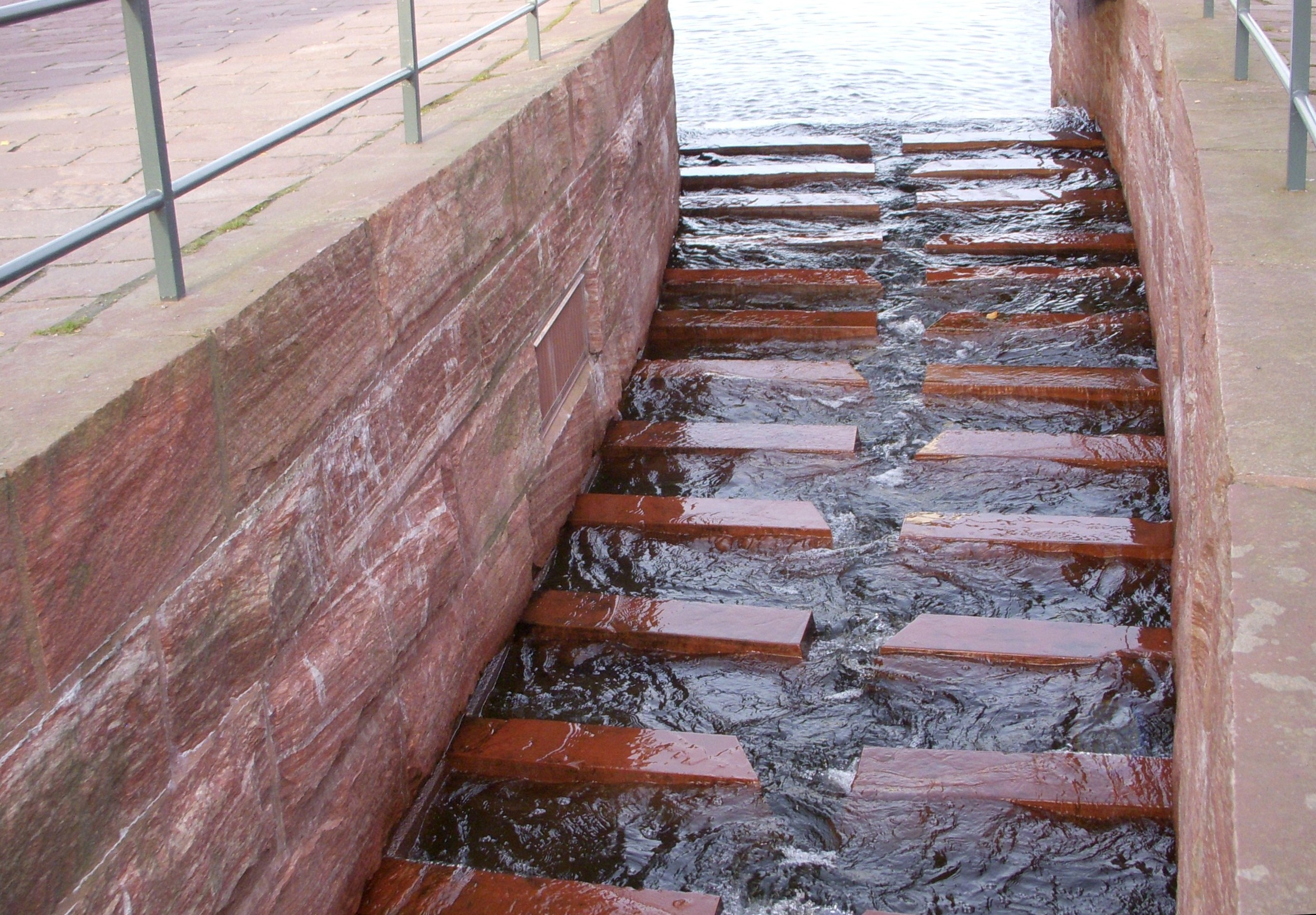 "Vattentrappan" i Hammarby sjöstad. Vattentrappan är skapad 2002 av konstnären Dag Birkeland.